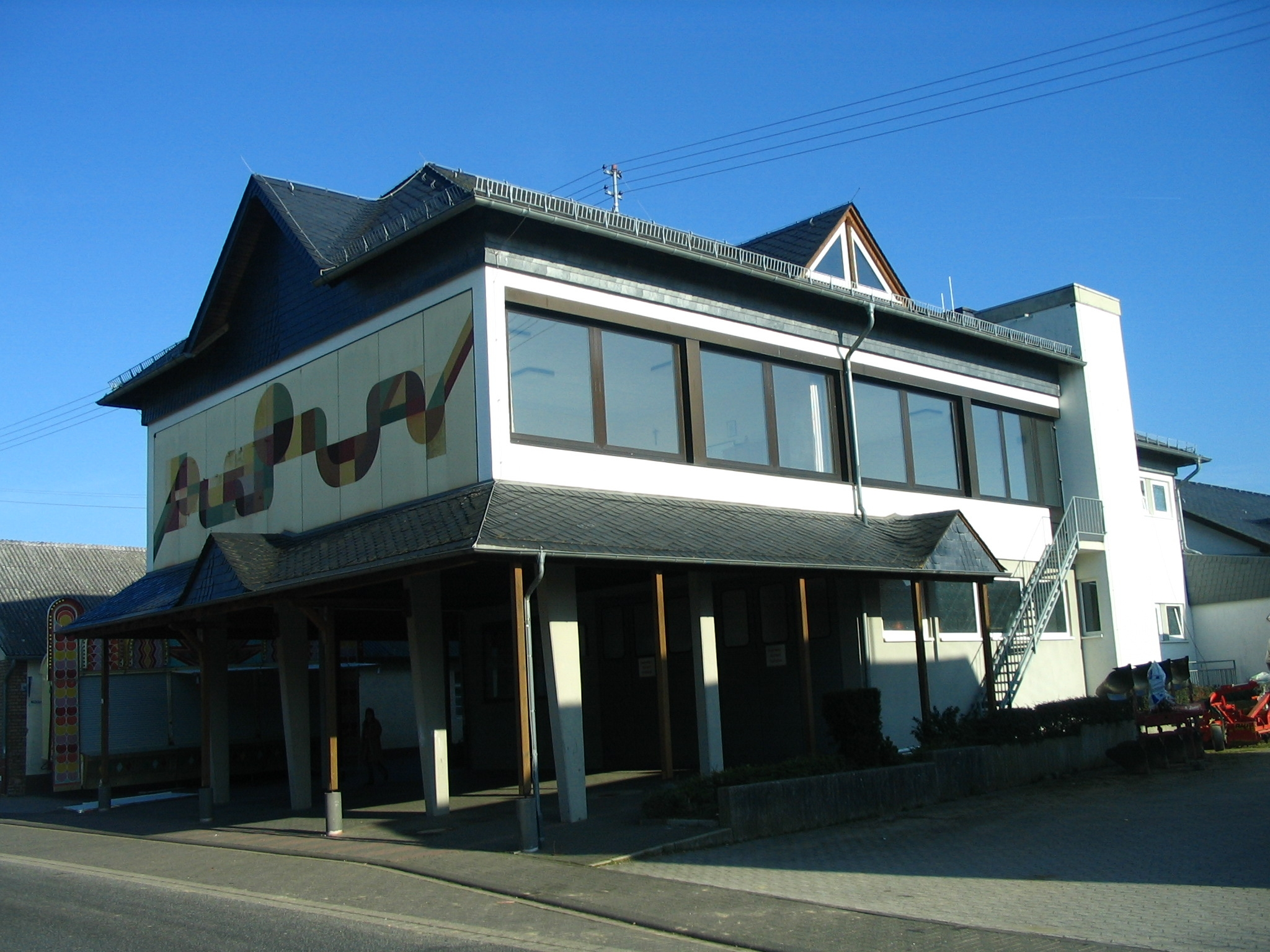 Gemeindehaus von Mörsdorf im Hunsrück